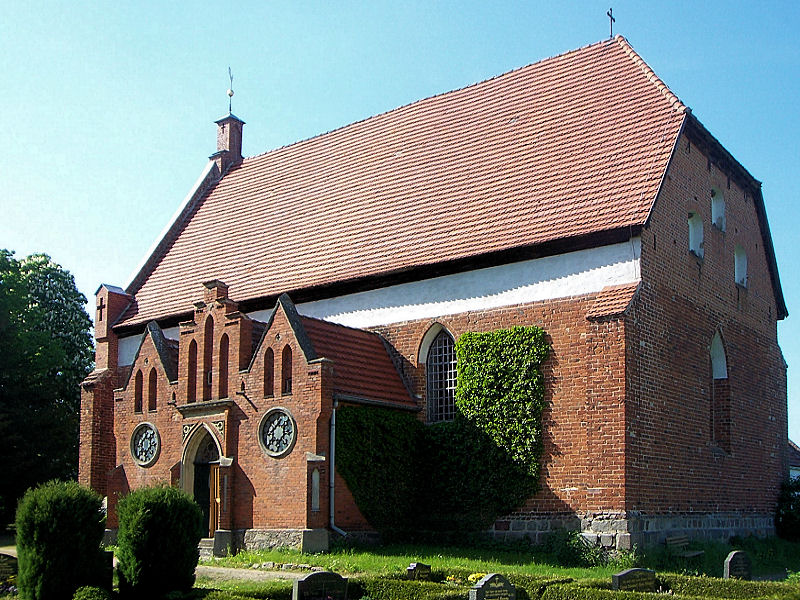 Kirche in Walkendorf, Landkreis Güstrow